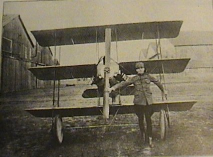 Il caproni Pensuti di fronte